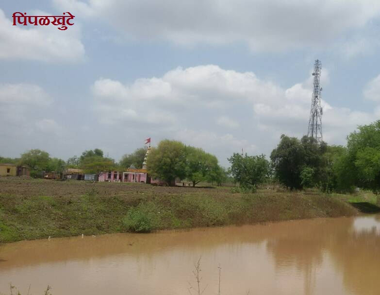 Pimpalkhunte Side view Near Temple